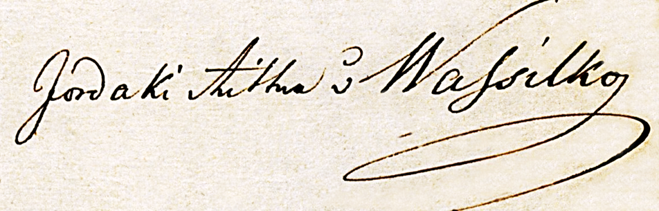 Iordaki Ritter von Wassilko, Autograph im Majestätsgesuch von 1854